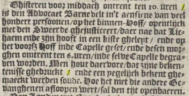 VVt ’s Gravenhaghe, den 14. Dito. Ghisteren voor middach ontrent ten 10. Uren is den Advocaet Barnevelt in’t aensiene van veel hondert persoonen op het binnen-hoff opentlijck met den Sweerde ghejusticeert daer nae dat Lichaem ende zijn hooft in een kiste gheleyt ende op het voorsz hoff inde Capelle geset ende desen morghen omtrent ten 6. Uren inde selve Capelle begraven worden. Men hout daervore dat zijne bekentenisse ghedruckt ende een yegelijck bekent ghemaeckt werden soude. Hoe het met die andere Gevanghenen afloopen wert sal den tijt openbaeren.